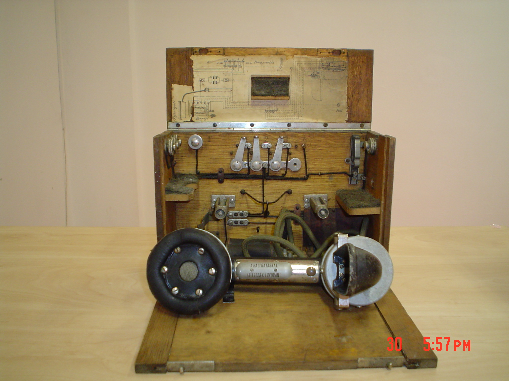 Kampa lignokesta telefono el la unua mondmilito